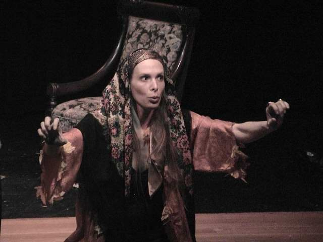 שלומית מנדל במופע קסמים